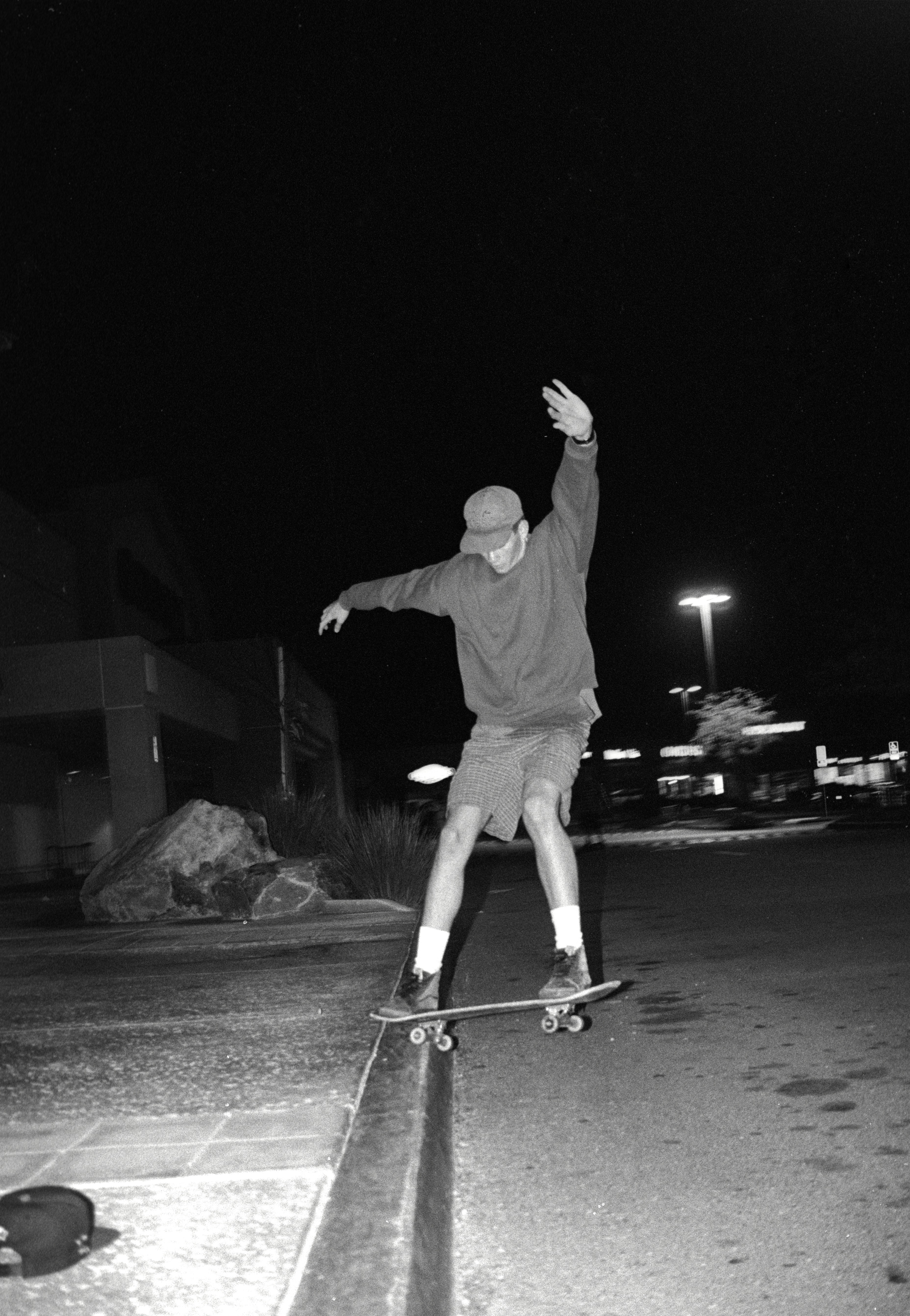 Tom Delonge slappy at Target parking lot